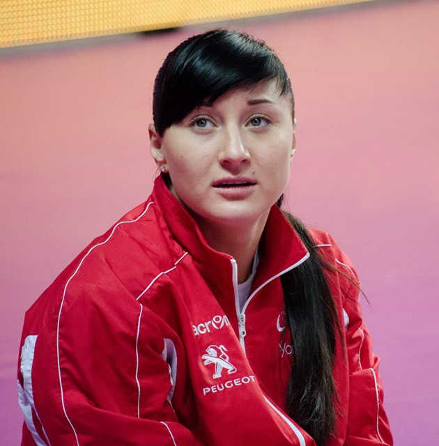 Pallavolista russa, gioca nel ruolo di centrale